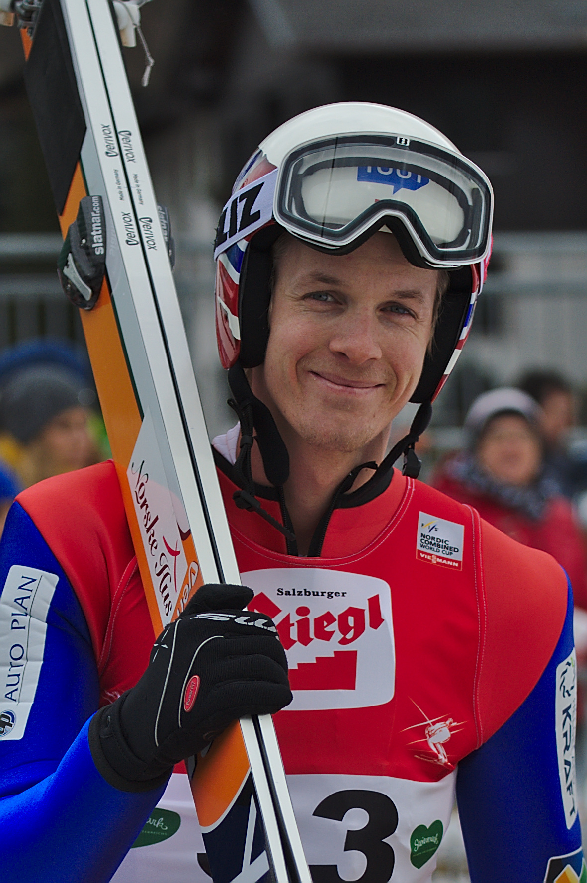 FIS Worldcup Nordic Combined Ramsau 2016. Bild zeigt Magnus Krog (NOR)